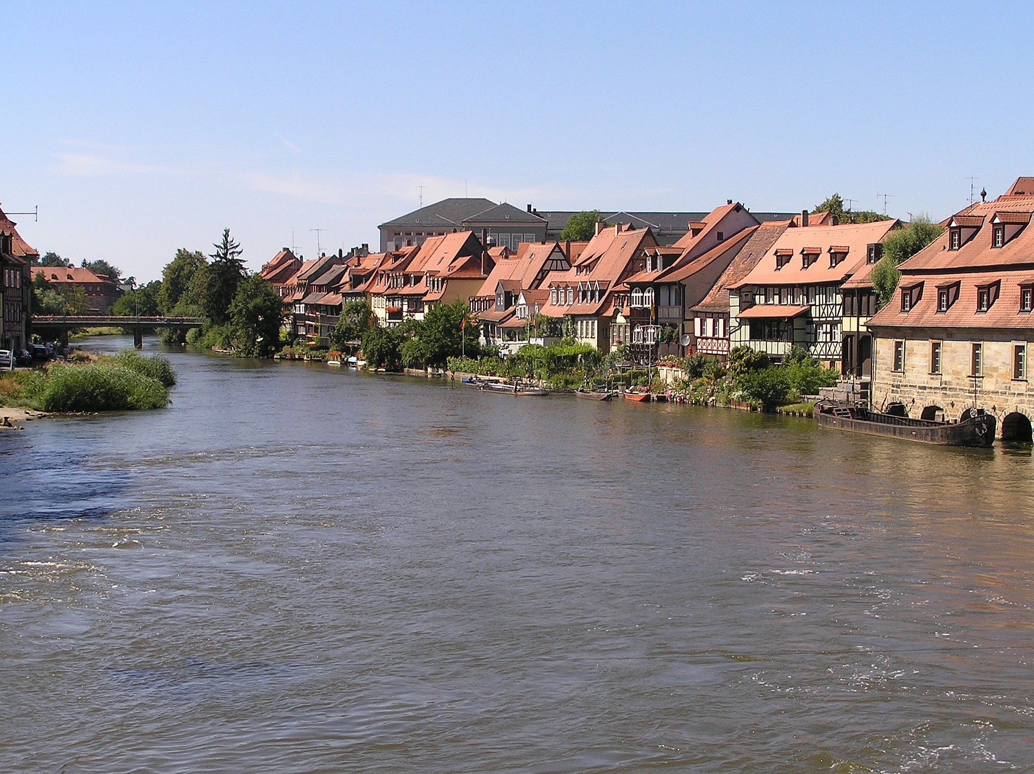 "Klein Venedig" in Bamberg. Kamera: Olympus C-765.